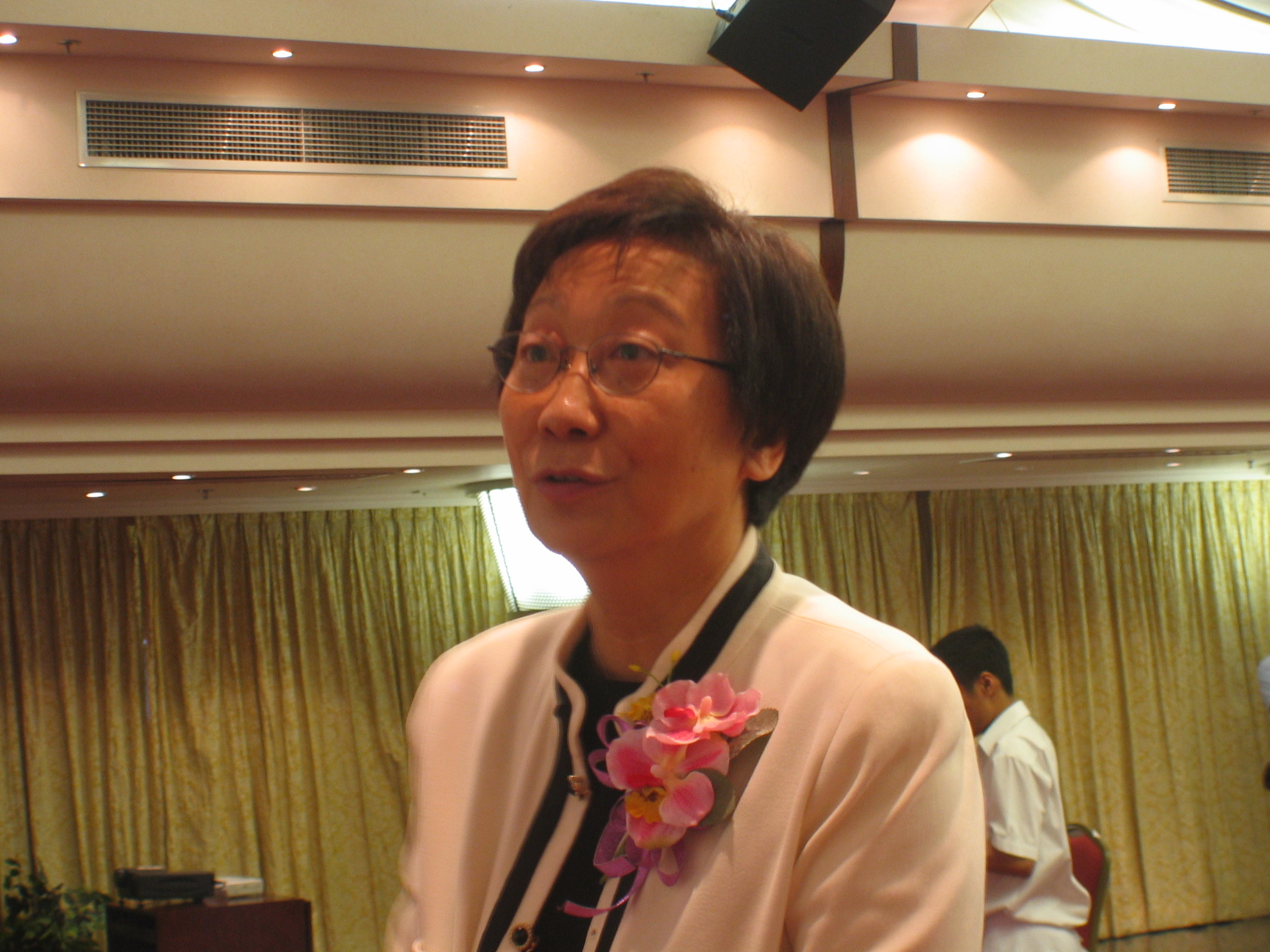 曹其真